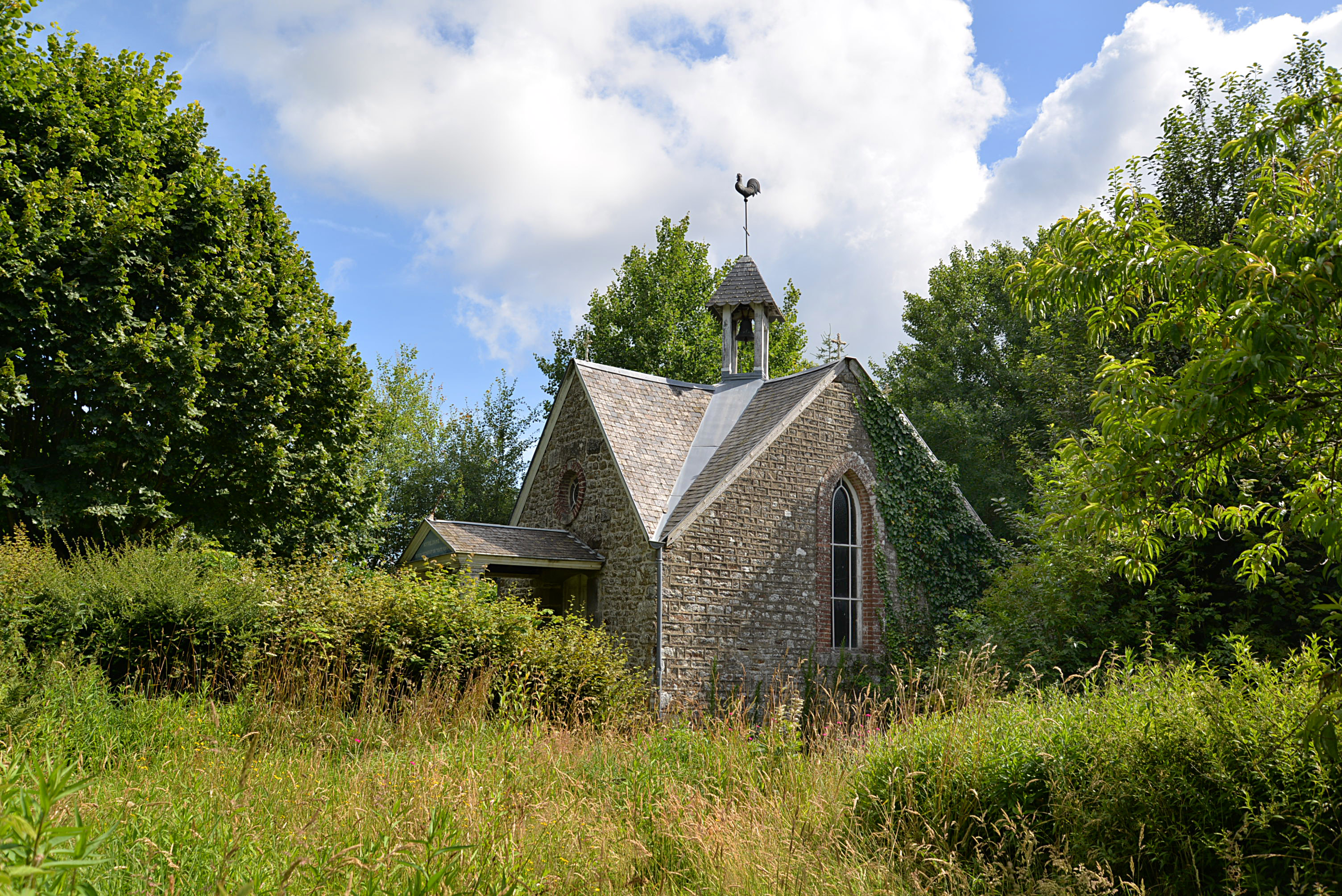 Saint-Jean-de-la-Haize (Manche)